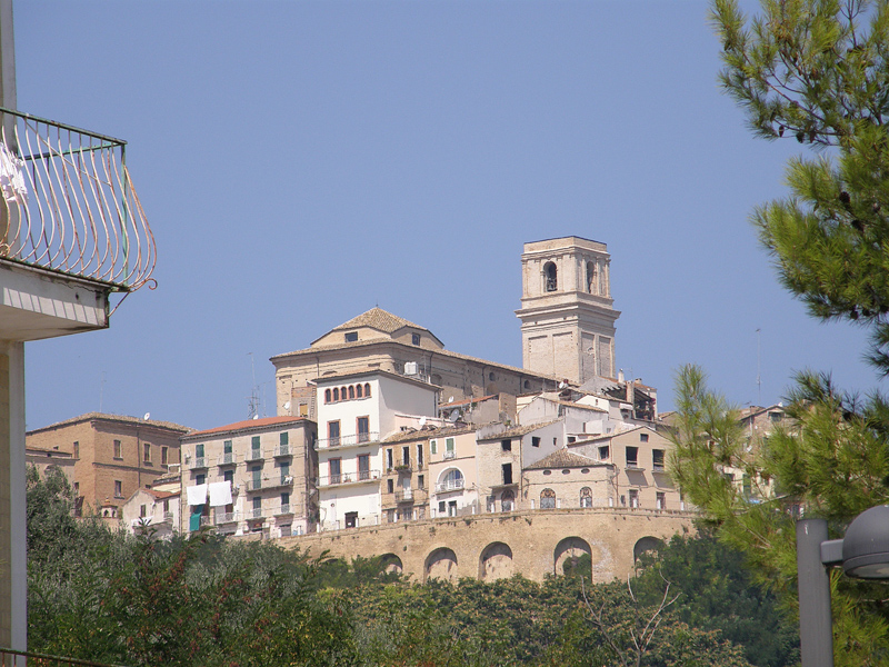 Vasto